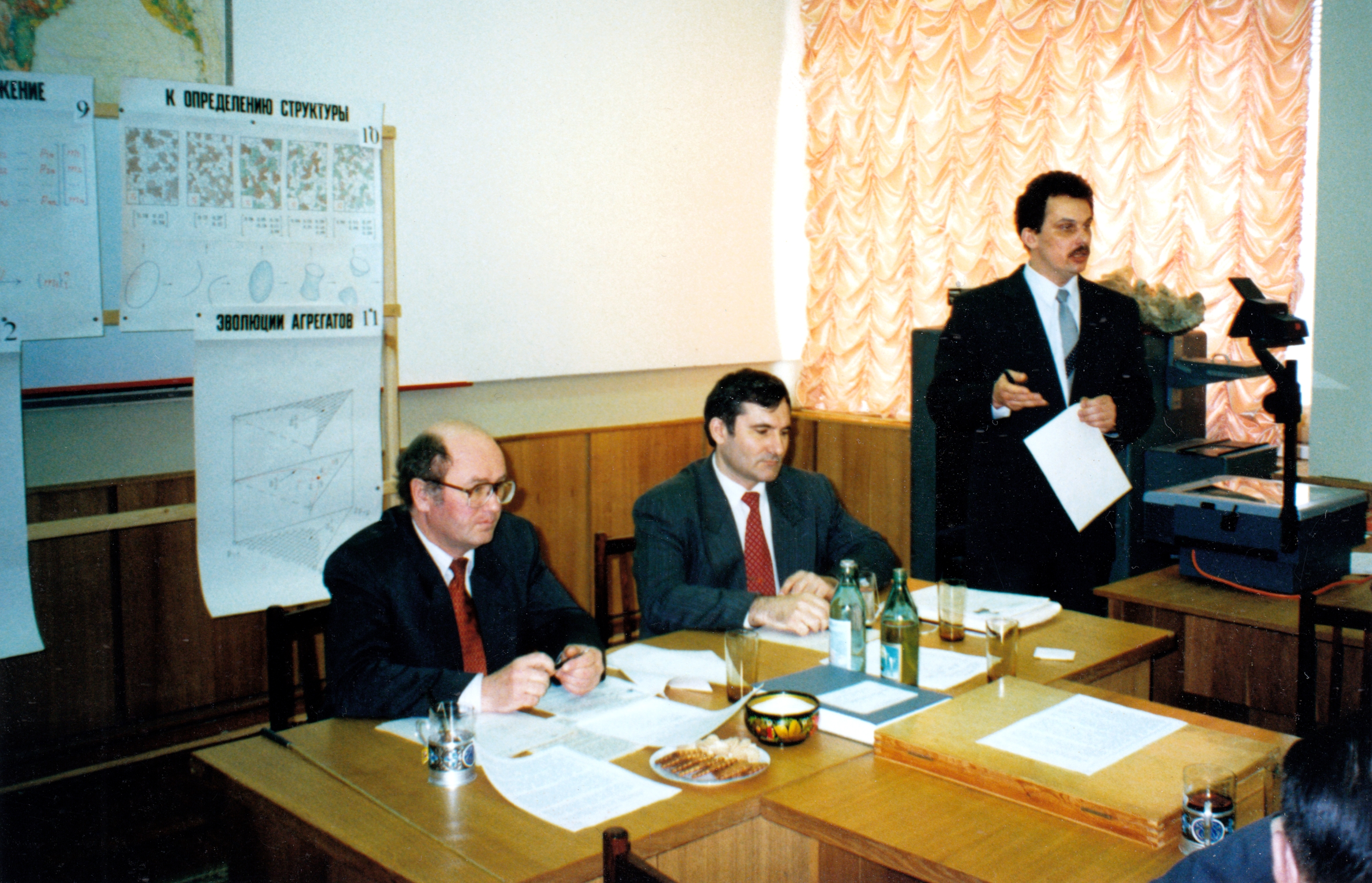 Войтеховский Ю.Л. защита докторской (стоит), сидят: Пыстин Александр Михайлович и Макеев А.Б., учёный секретарь диссертационного совета.